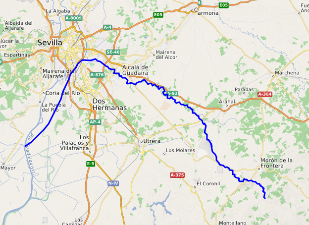 carte réalisée sur umap This map may be incomplete, and may contain errors. Don't rely solely on it for navigation.